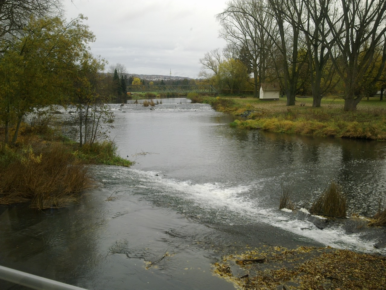 Die Lahn bei Wetzlar-Naunheim